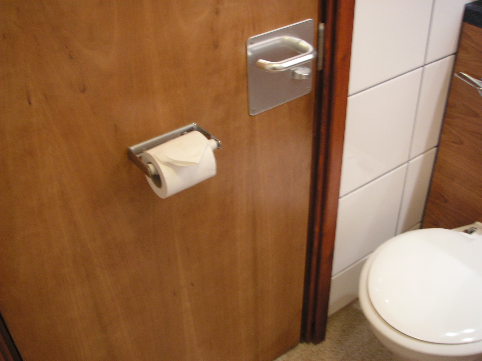 なんでドアについてるんだ……